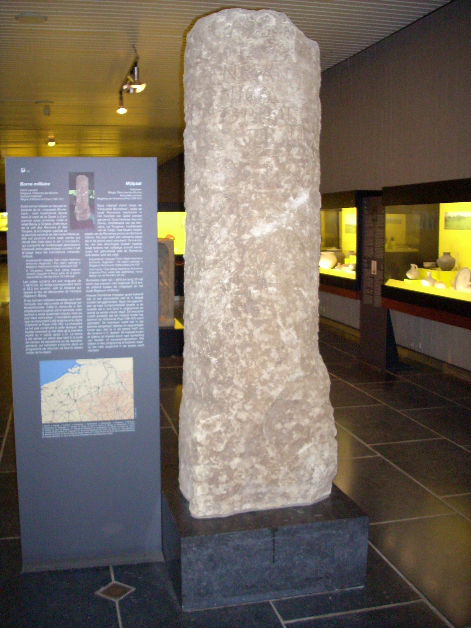 Borne de l'empire romain trouvé à Péronnes (près de Binche, Belgique) et exposée au musée de Mariemont